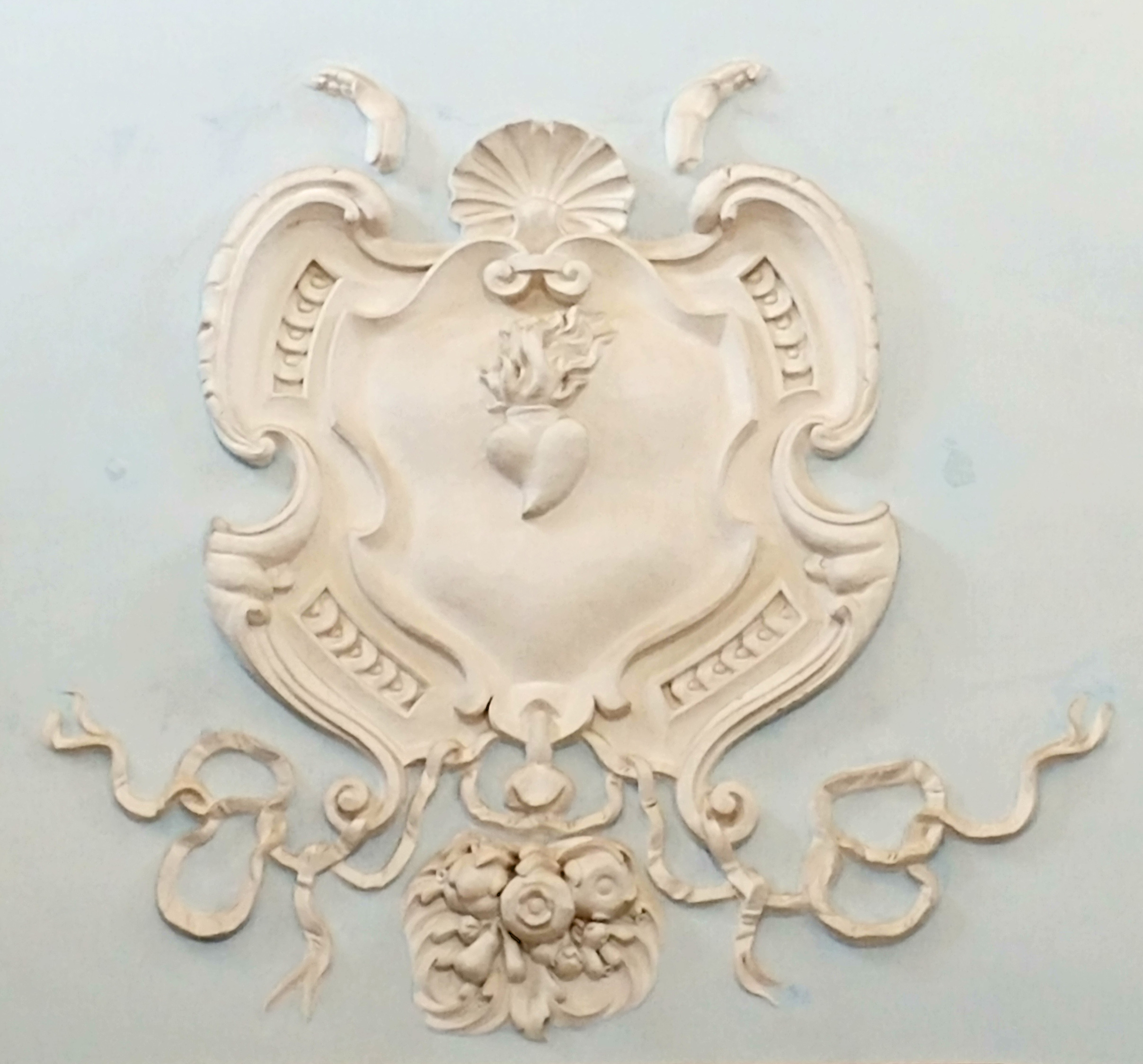 Stemma dell'Ordine degli Agostiniani Scalzi, in controfacciata.